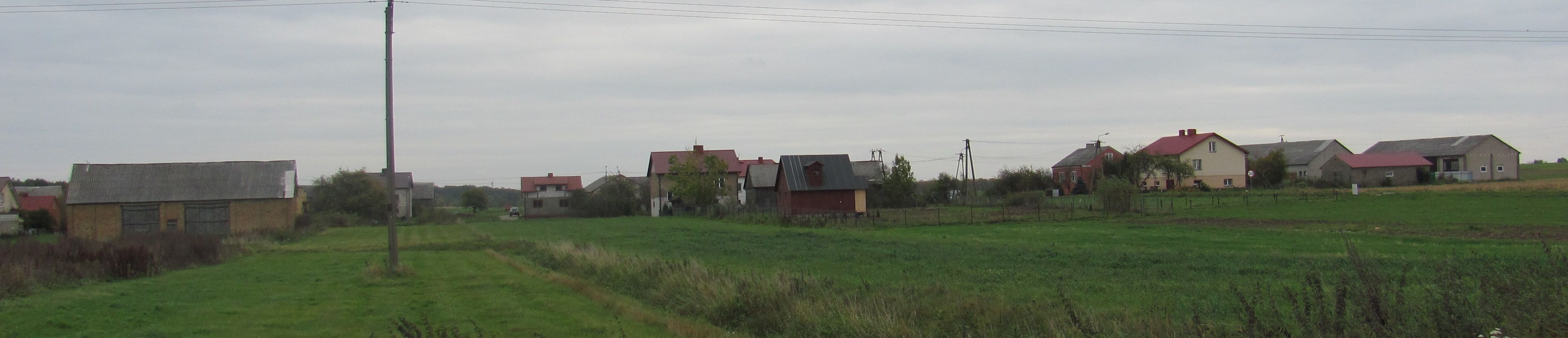 Widok części wsi od zachodu.